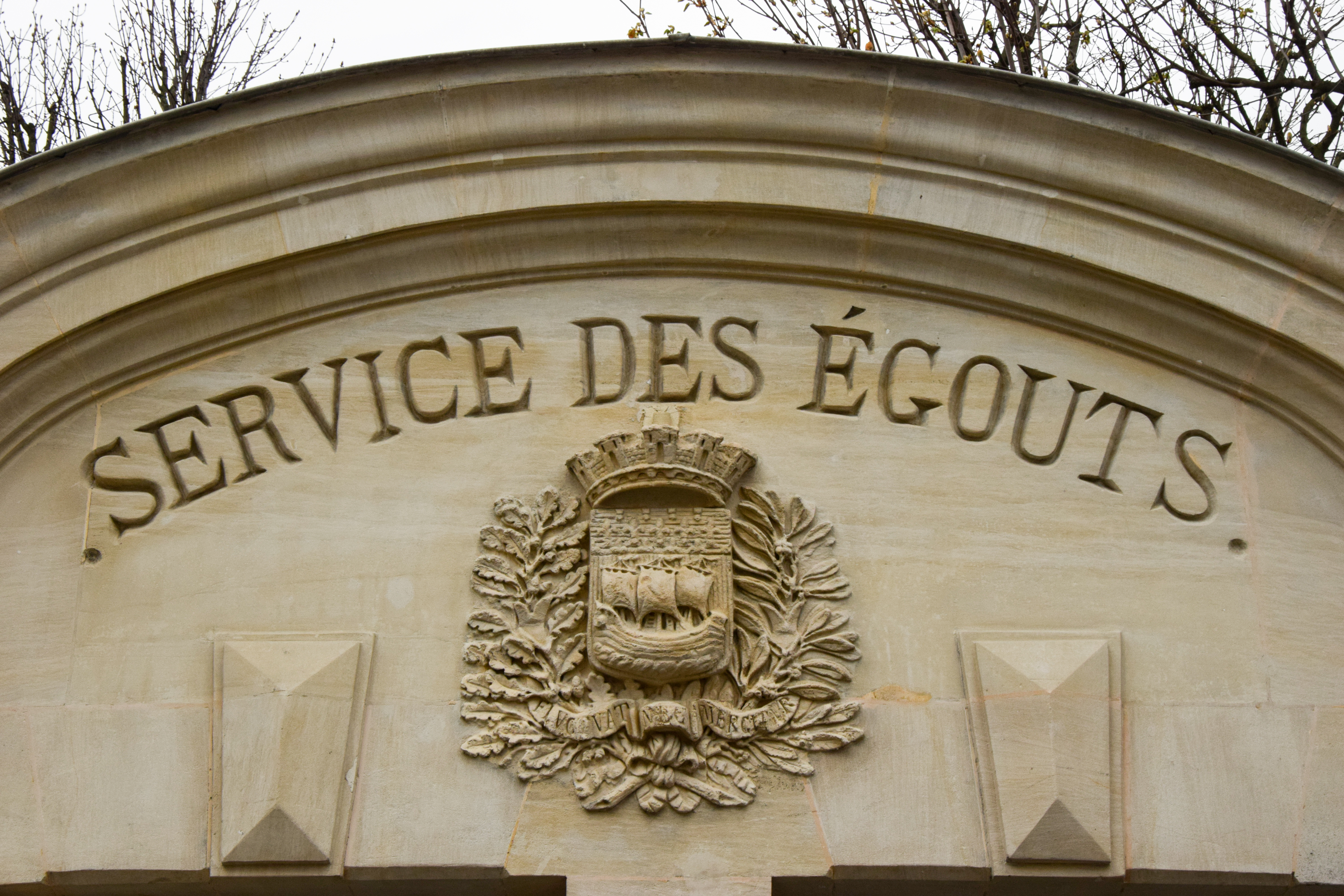 Entrée des égouts de Paris sur la place du guignier, Paris, France